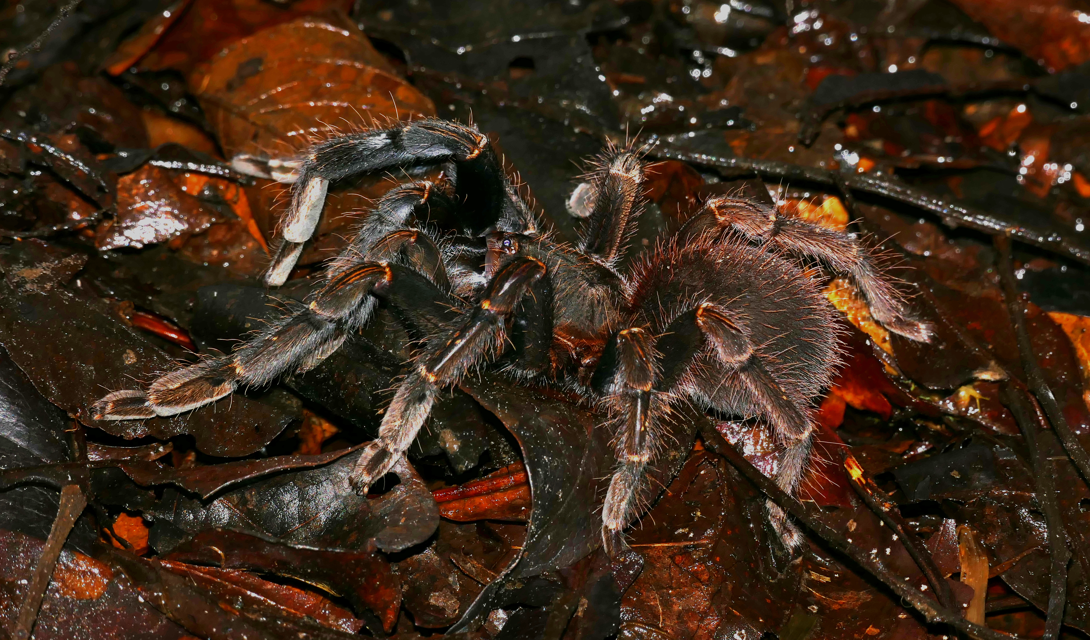 Montagne de Kaw, Roura, French Guyana, FRANCE